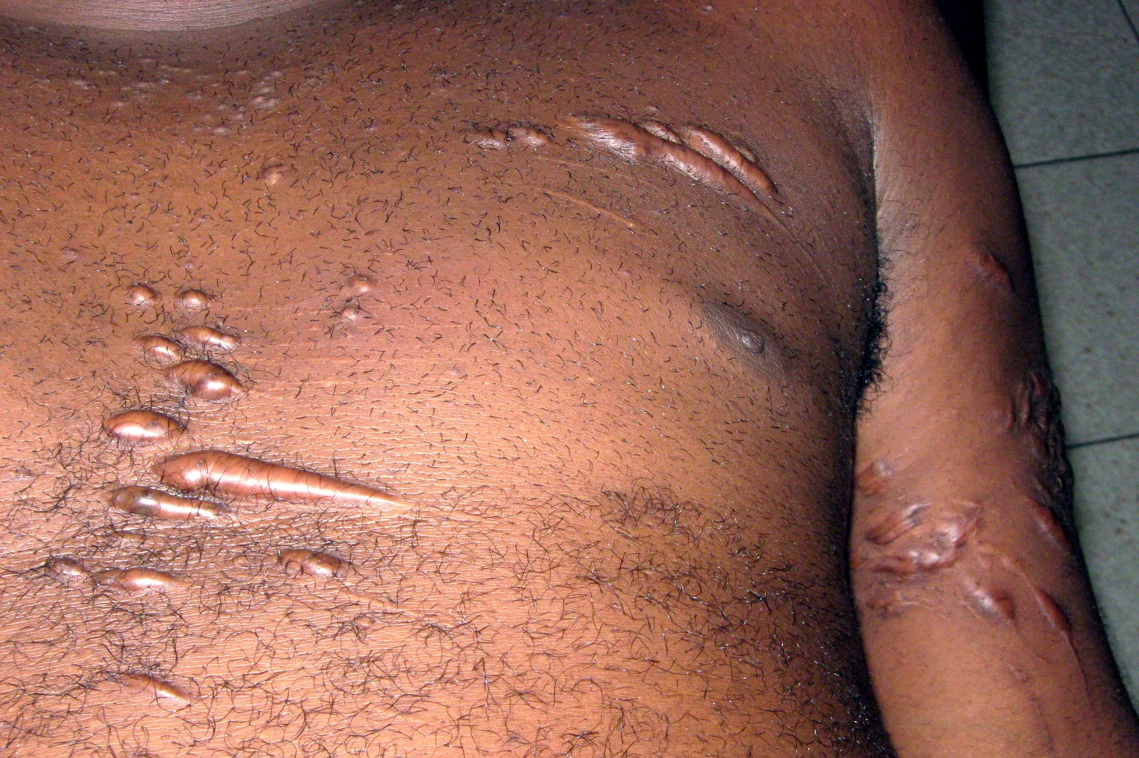 Cicatrices chéloïdes sur torse et bras, après plaies superficielles il y a environ 6 mois